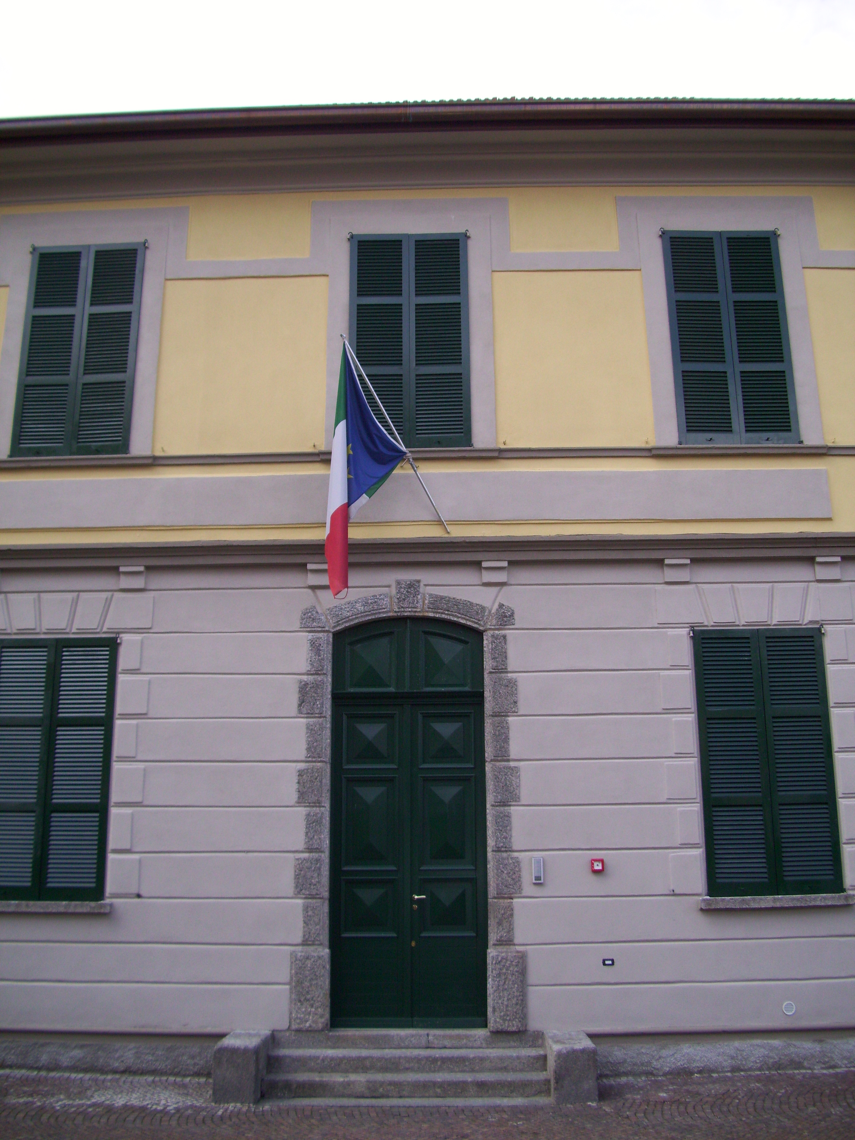 Ingresso delle ex-scuole elementari di Albate